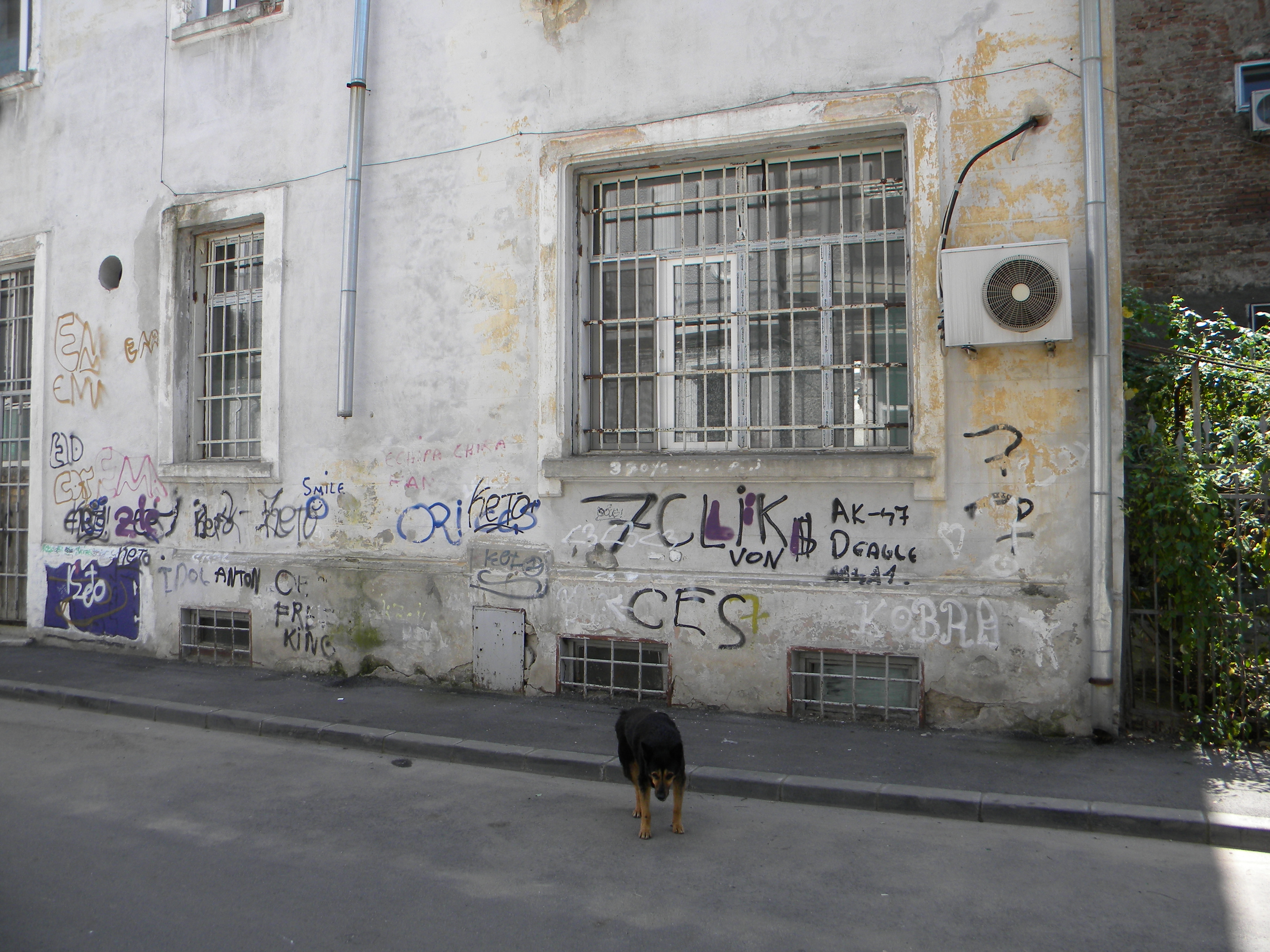 Bucuresti, Romania, Casa pe Str. Patrascu Voda nr. 14; B-II-m-B-19374